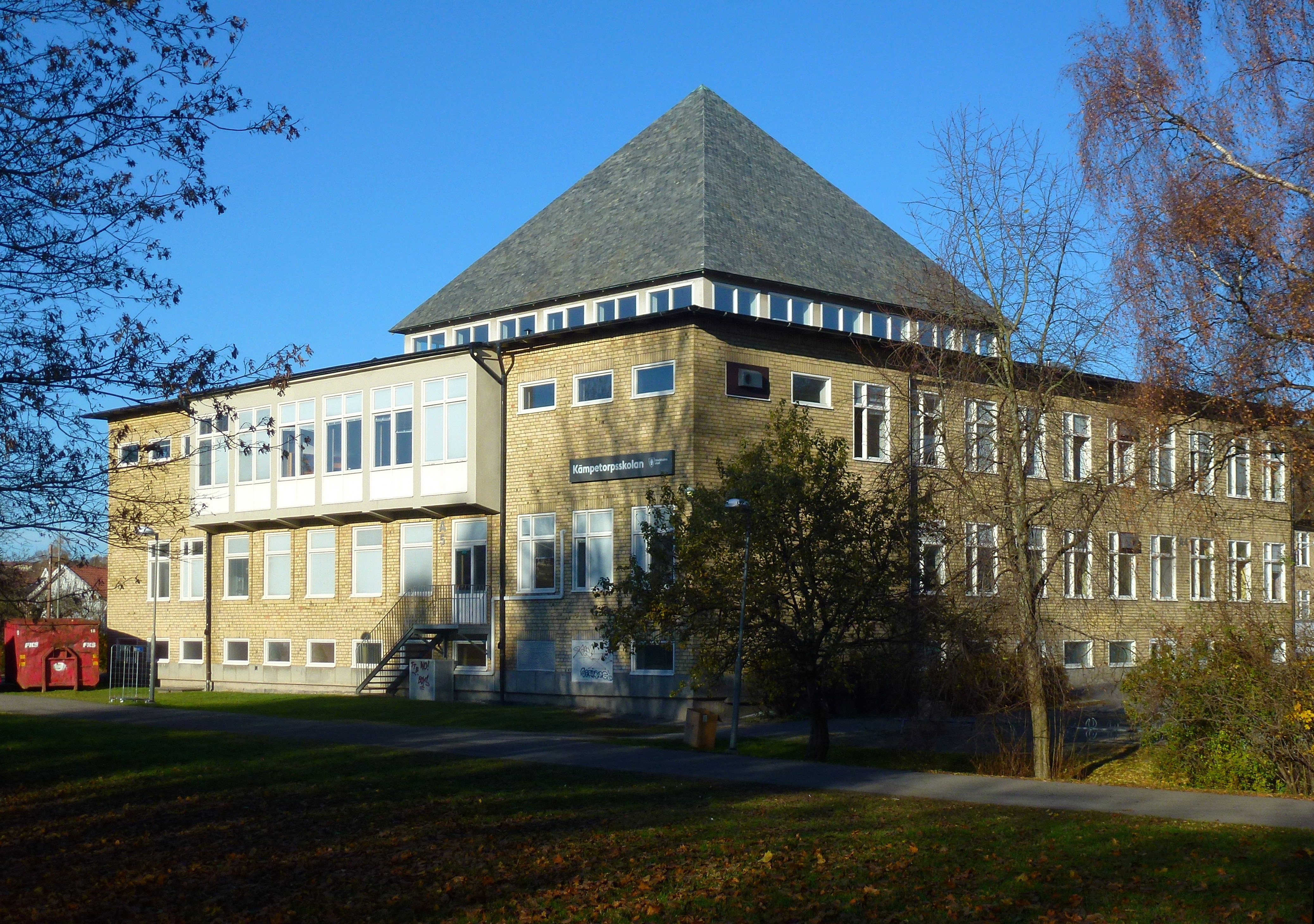 Kämpetorpsskolan